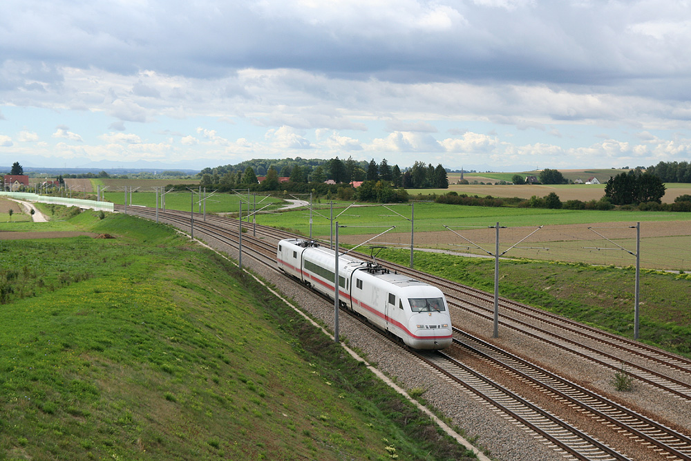 ABS München–Ingolstadt nahe Hebertshausen mit ICE S auf Messfahrt.